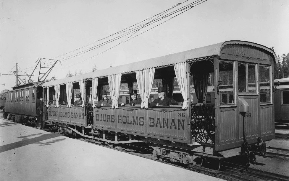 Djursholmsbanan, herrarna i tåget, fr. vänster: elingenjör Karth, trafikchef Lars Victor Ståhle, brukspatron Nils Germund Cederhielm och styrelsens ordförande Albert Erland Uggla